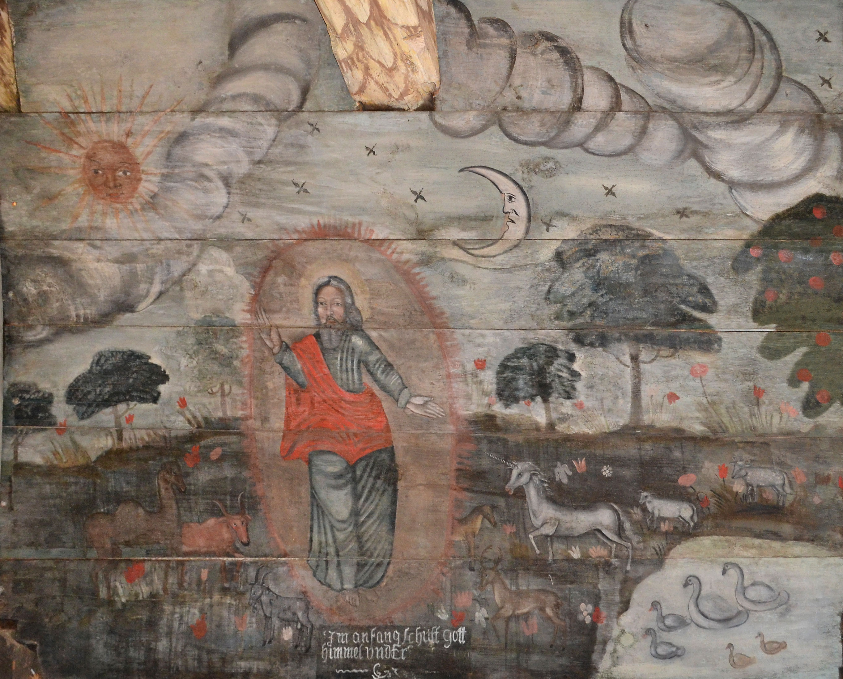 Kościół w Dzisnej (województwo zachodniopomorskie)